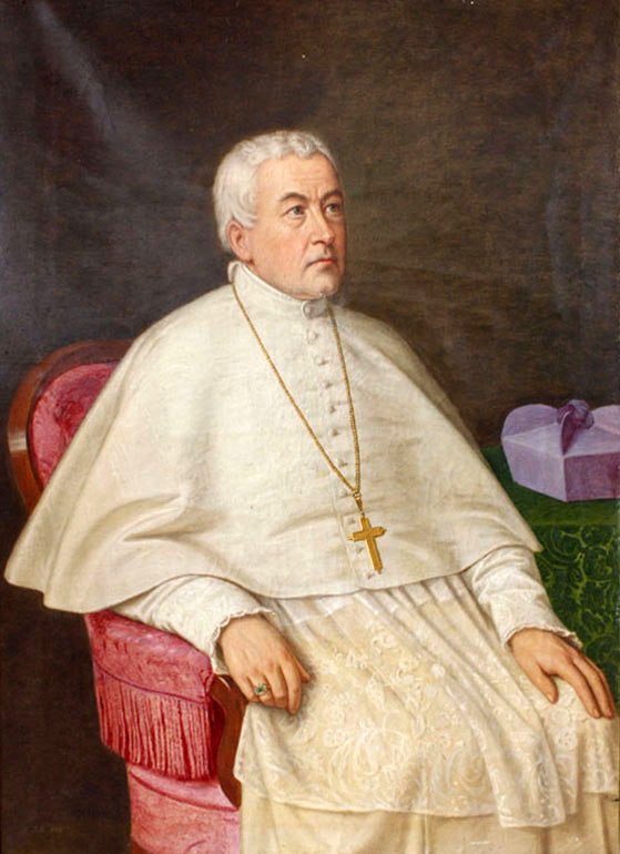 Franz Sales Blaas (1817-1888), 49. Abt von Stift Wilten (1877-1888)